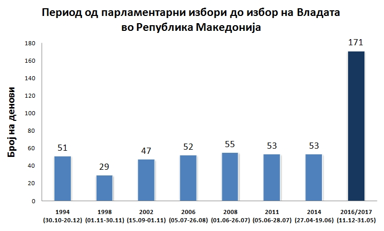 Период од парламентарните избори до изборот на Влада во Република Македонија